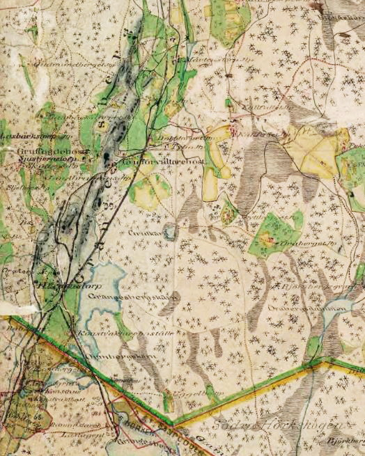 Del av Häradskartan 1866-1867 visande Grängesbergs gruvfält